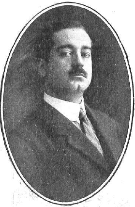 Fotografía del escritor español Melchor Almagro publicada en 1915 con motivo de la publicación de su conferencia Renacimiento cultural de Granada, pronunciada en el Centro Artístico de Granada.